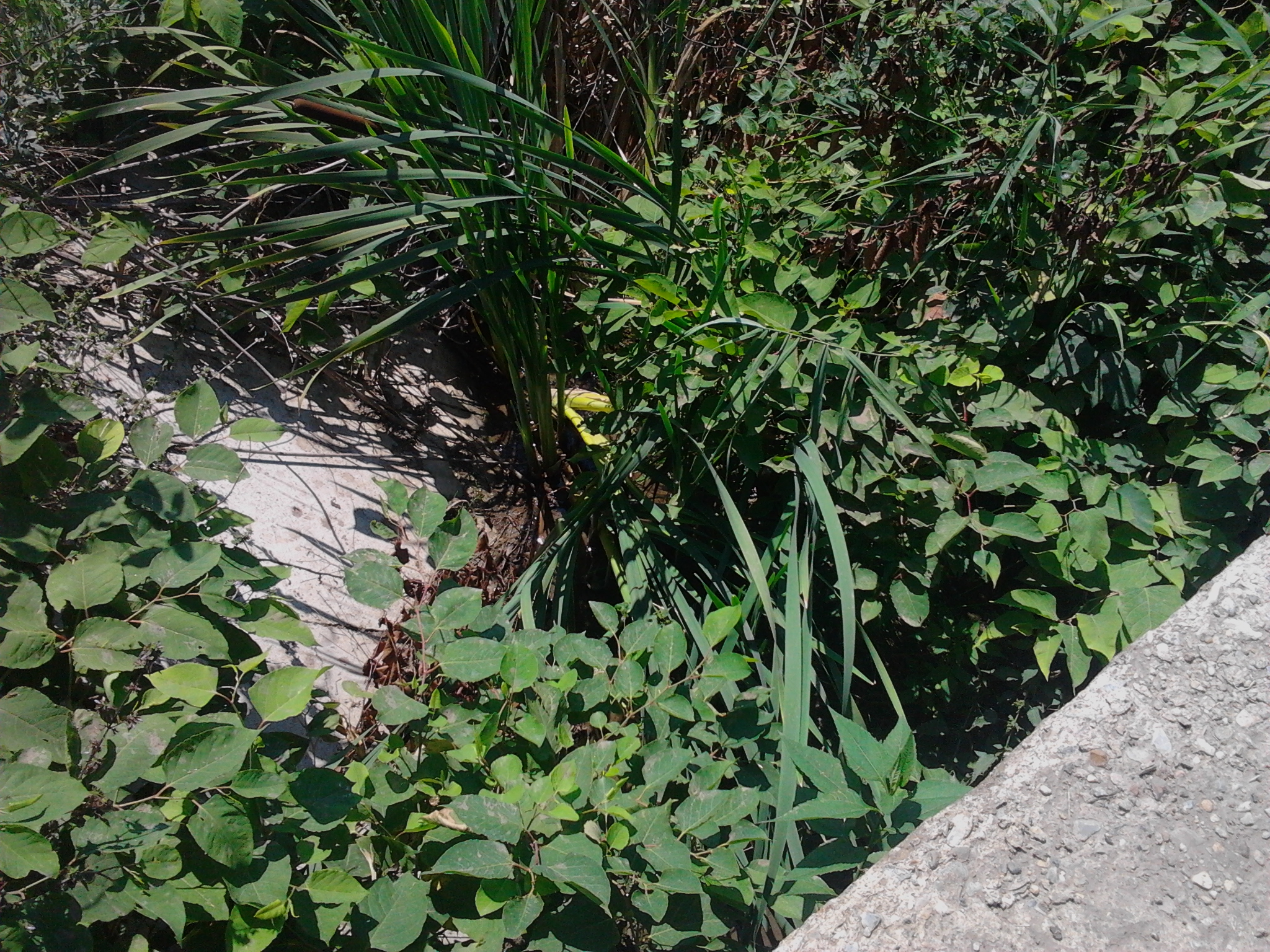 A Kánya-patak nyári, alacsony vízállásnál.